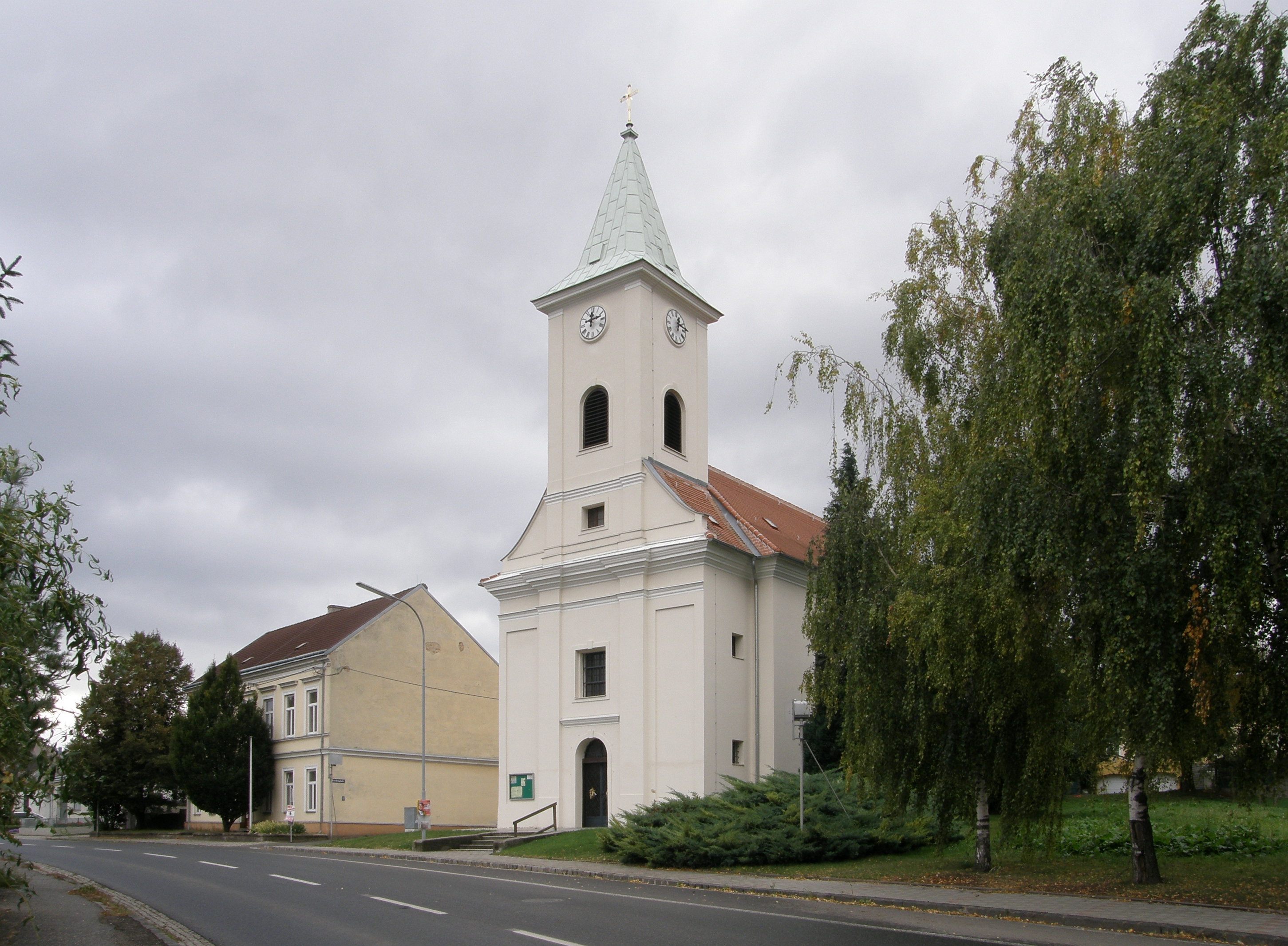 Kath. Pfarrkirche hll. Petrus und Paulus